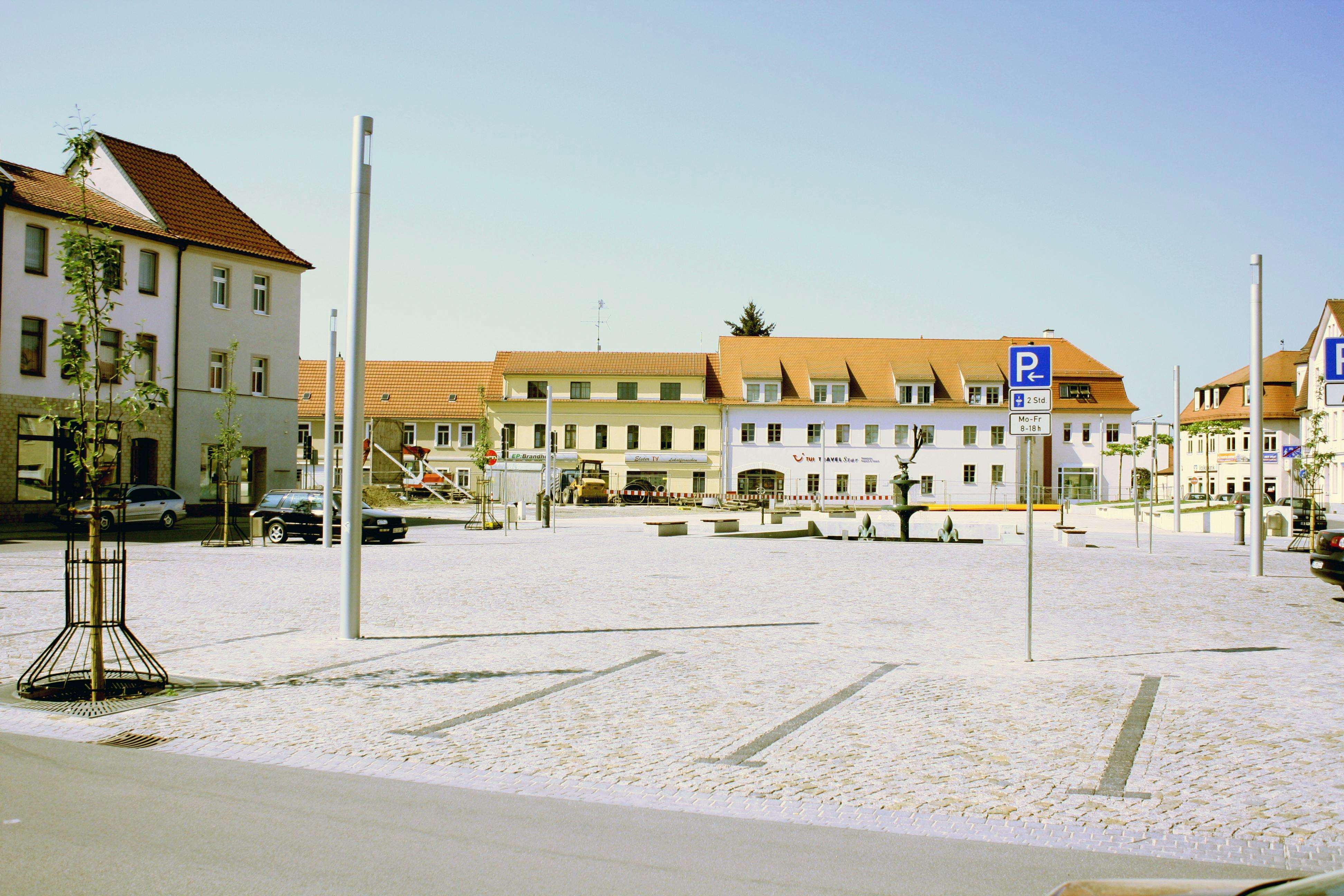 Marktplatz Elsterwerda nach Umbau (2009)